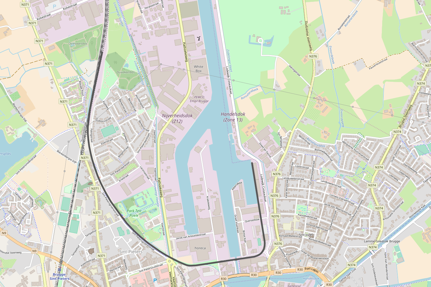 Belgian Railway Line 201, Brugge-Dijk - Brugge-Zeehaven